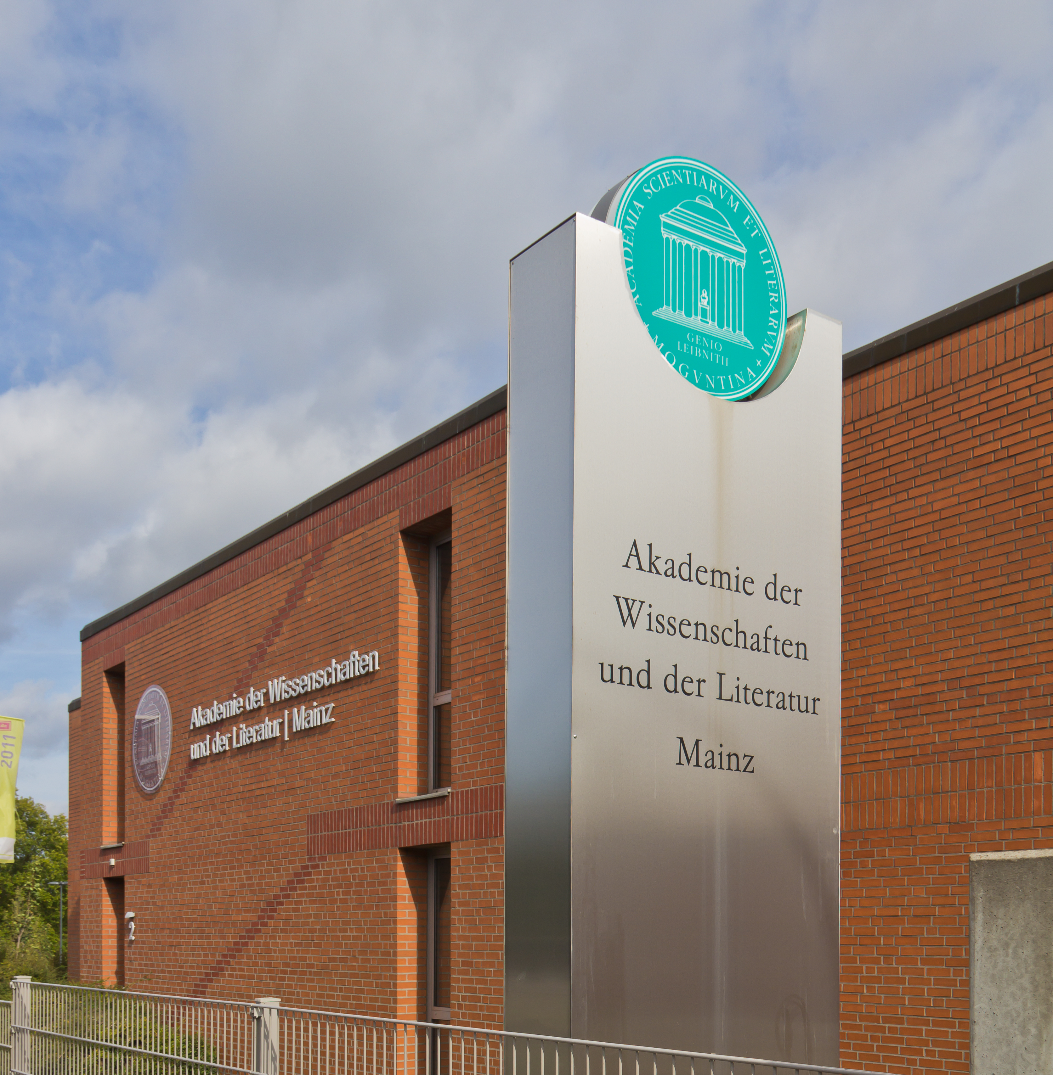 Akademie der Wissenschaften und Literatur Mainz. Außenansicht Geschwister-Scholl-Straße 2, Mainz.